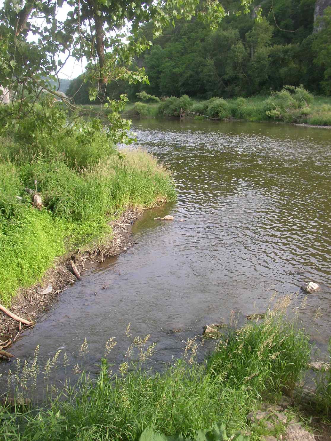 Ústí potoka Loděnice (Kačáku) do Berounky